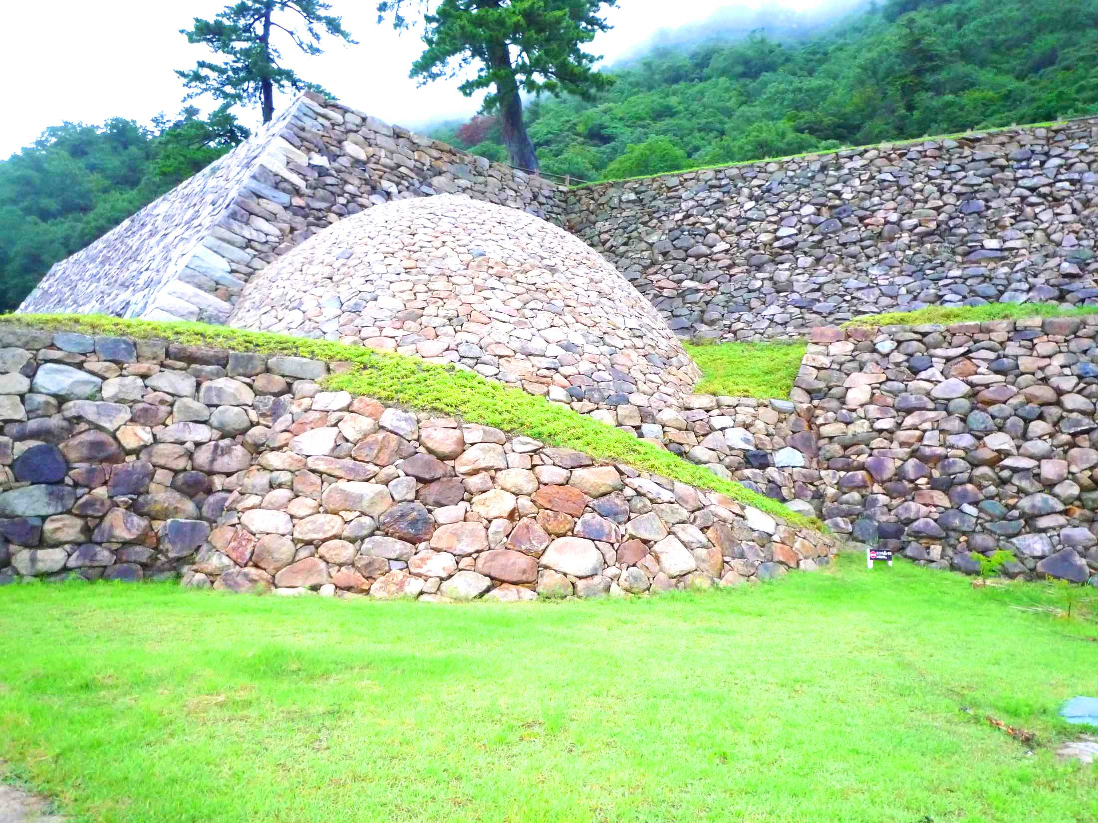 巻石垣（鳥取城の天球丸）